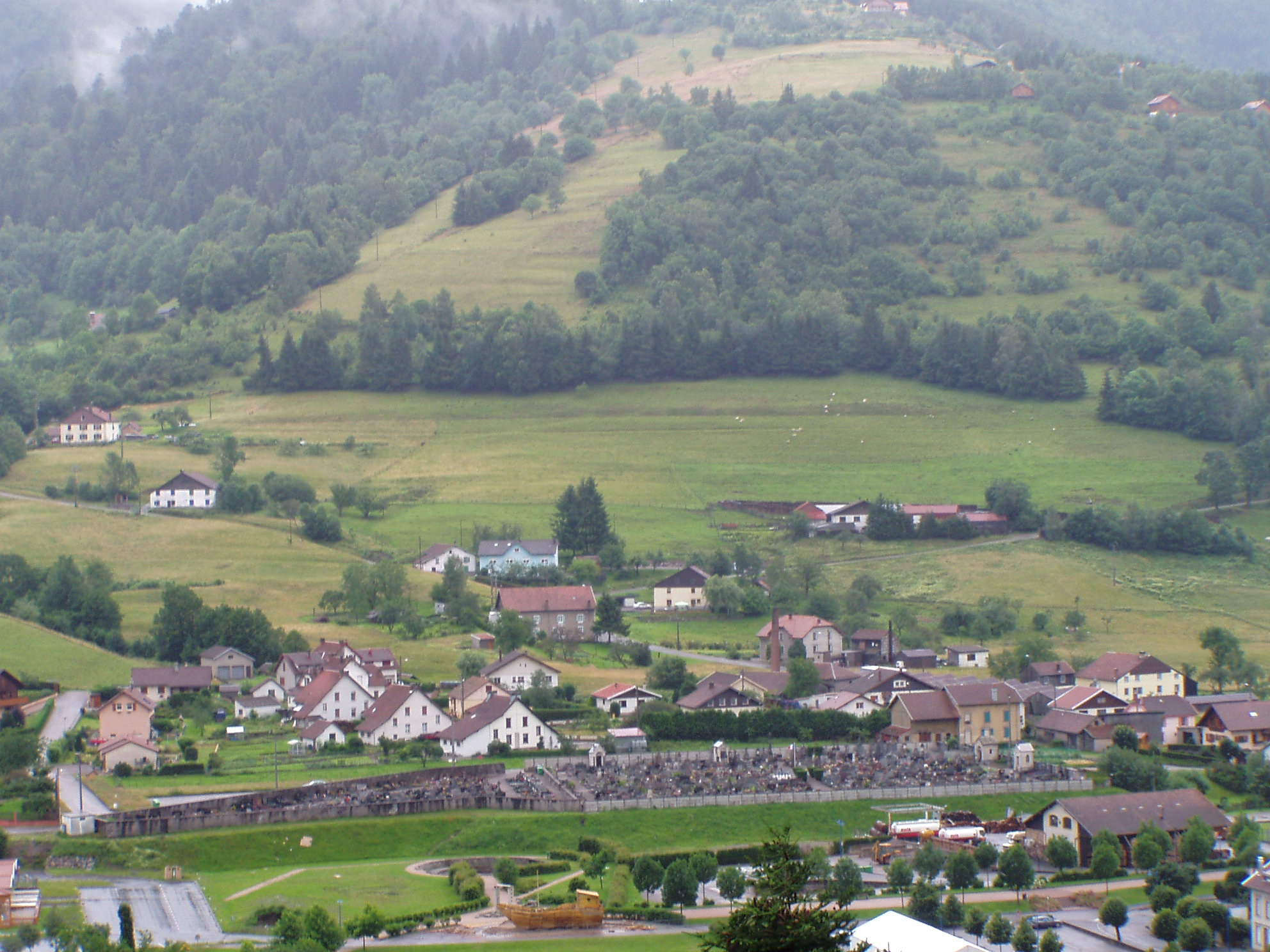 Bussang